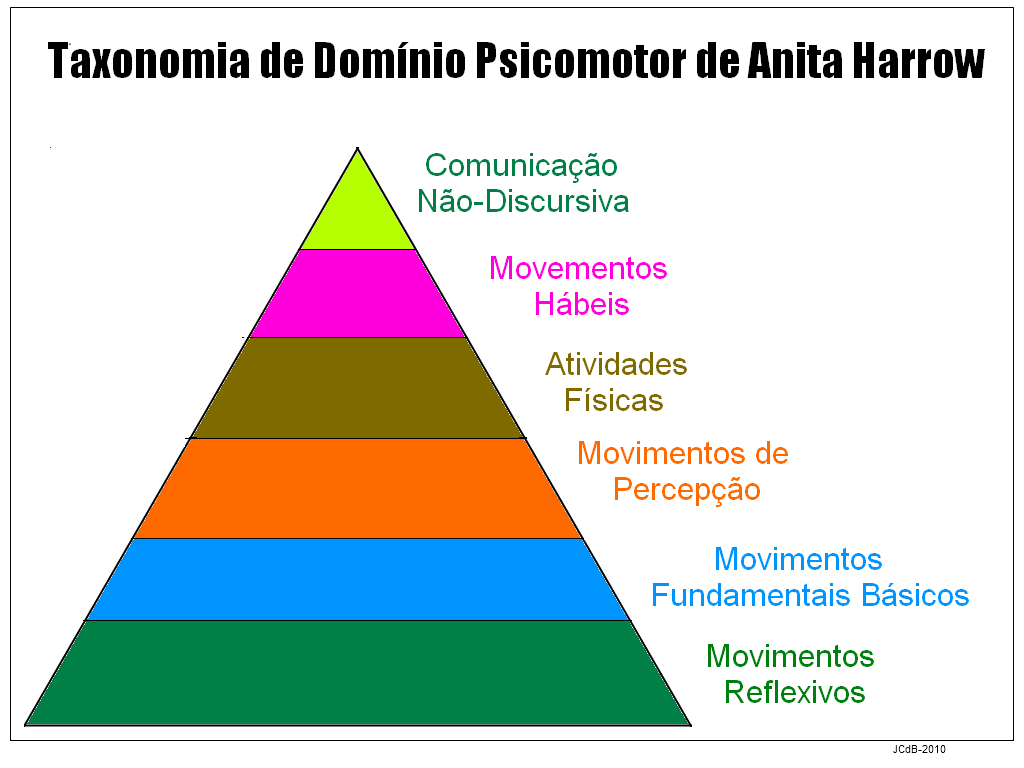 Gráfico em Forma de Pirâmide Hierárquica baseado na fonte original